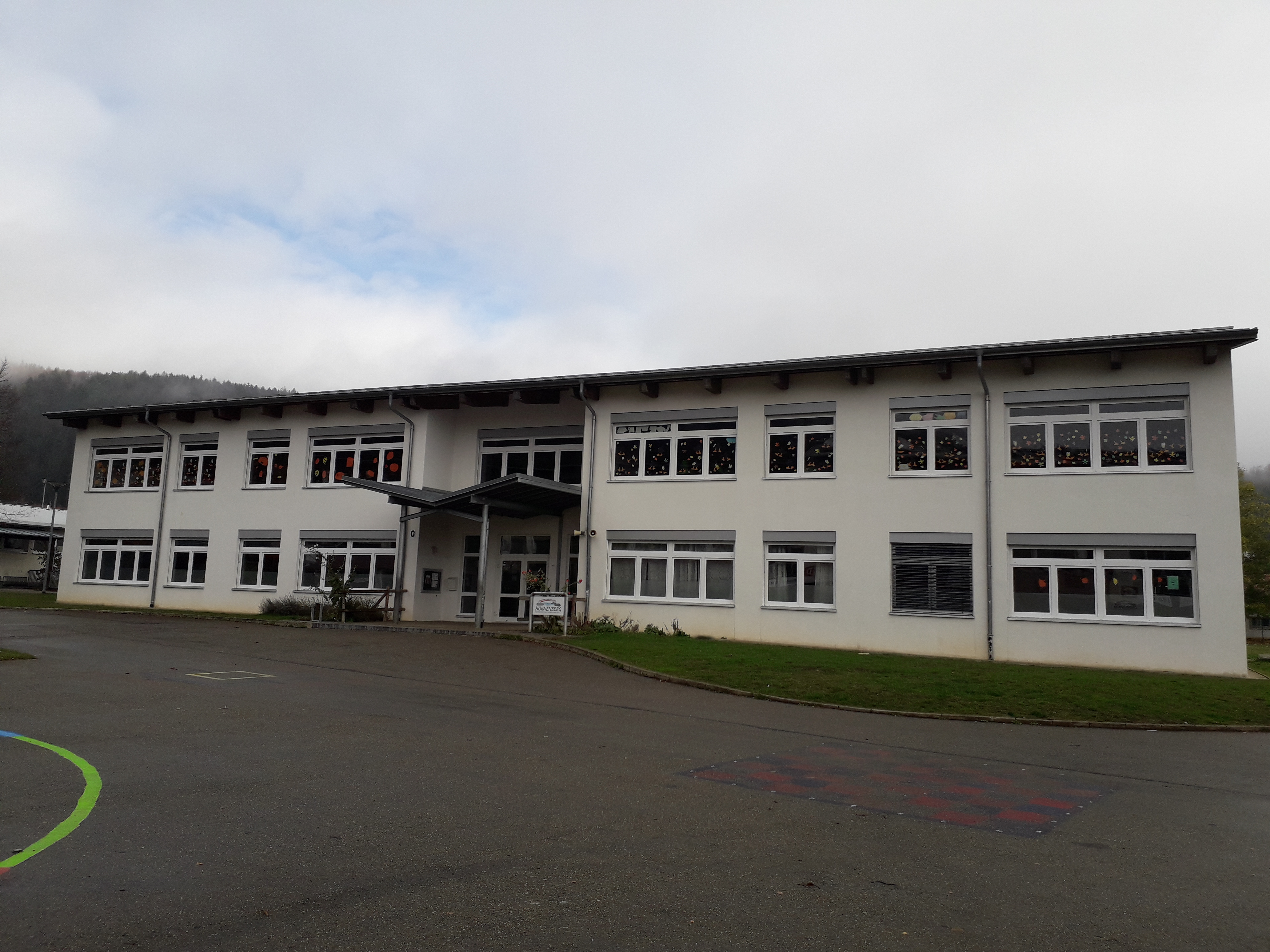 Ancienne école française (école de la direction de l'enseignement français en Allemagne) "frères Grimm" à Immendingen devenue en 2011 une école allemande au départ du 3e régiment de Hussard.